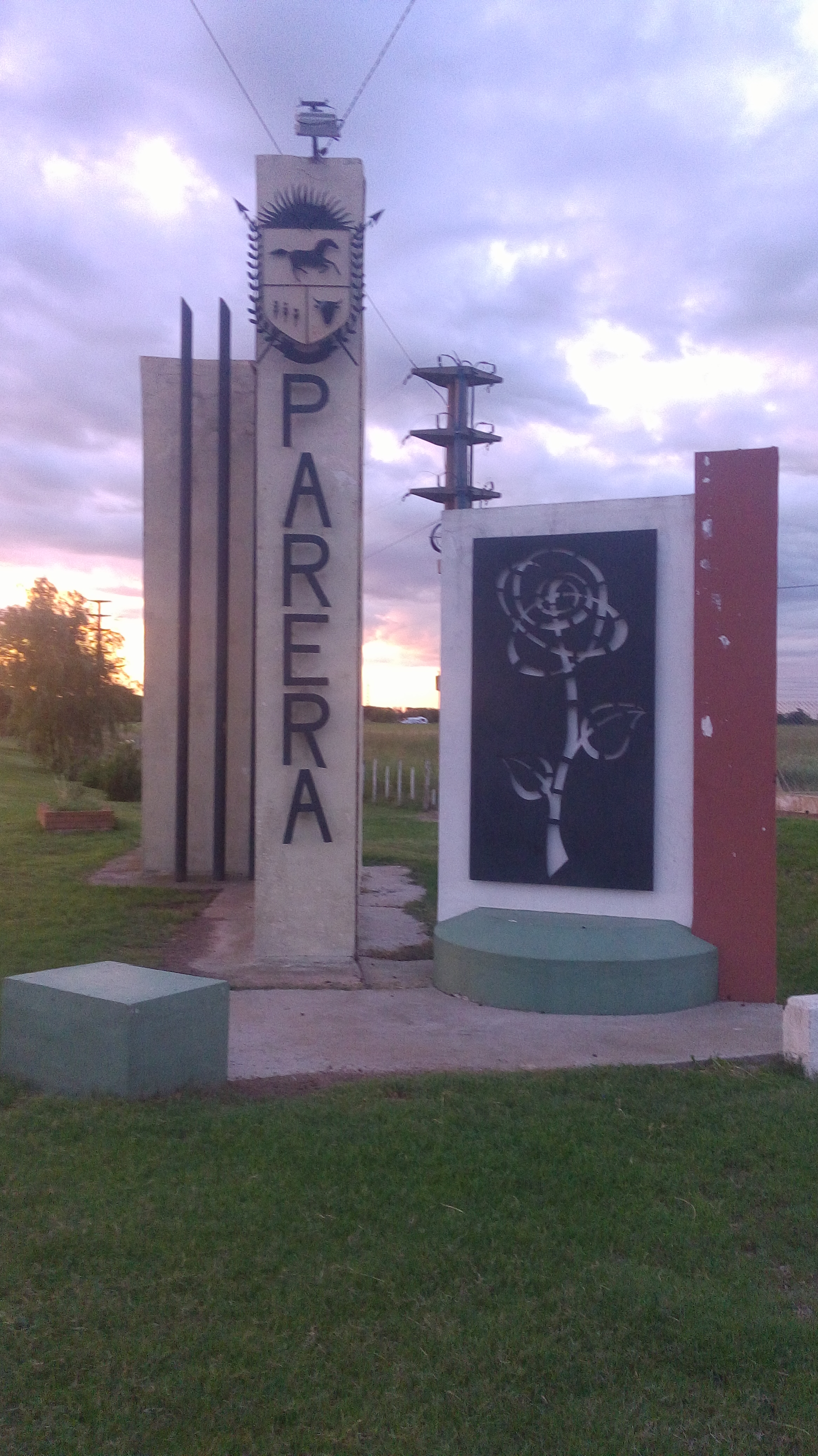 Entrada de la localidad de Parera, La Pampa, Argentina